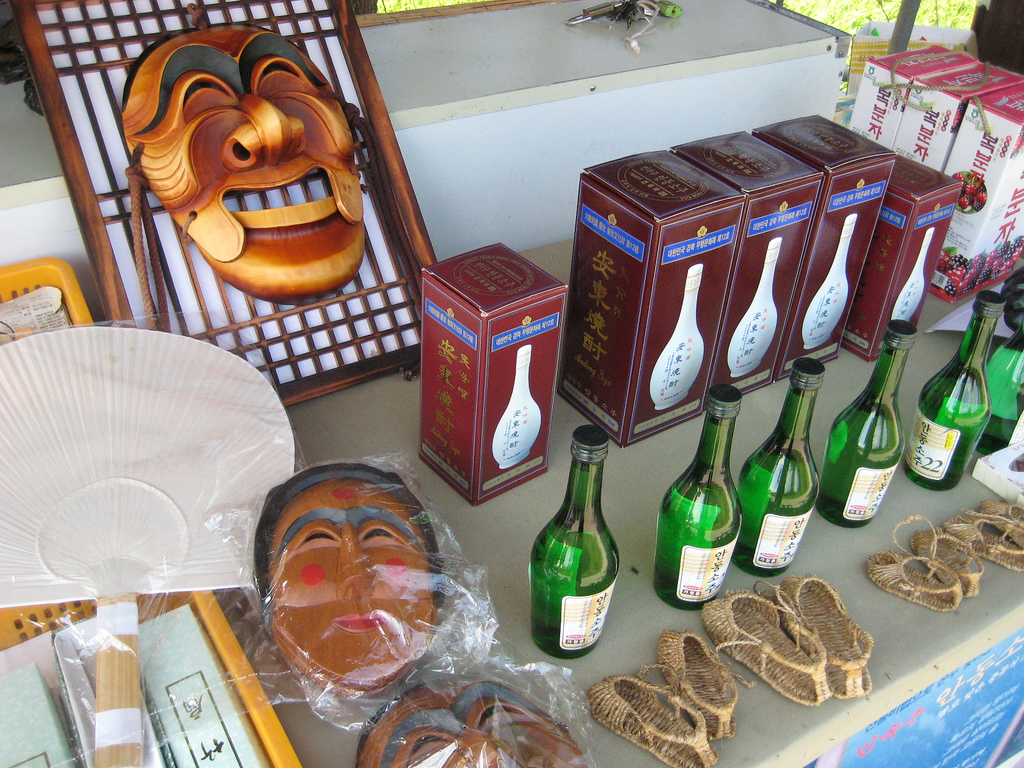 Andong soju and hahoe masks sold at Hahoe Folk Village in Andong, Gyeongsangbuk-do, South Korea